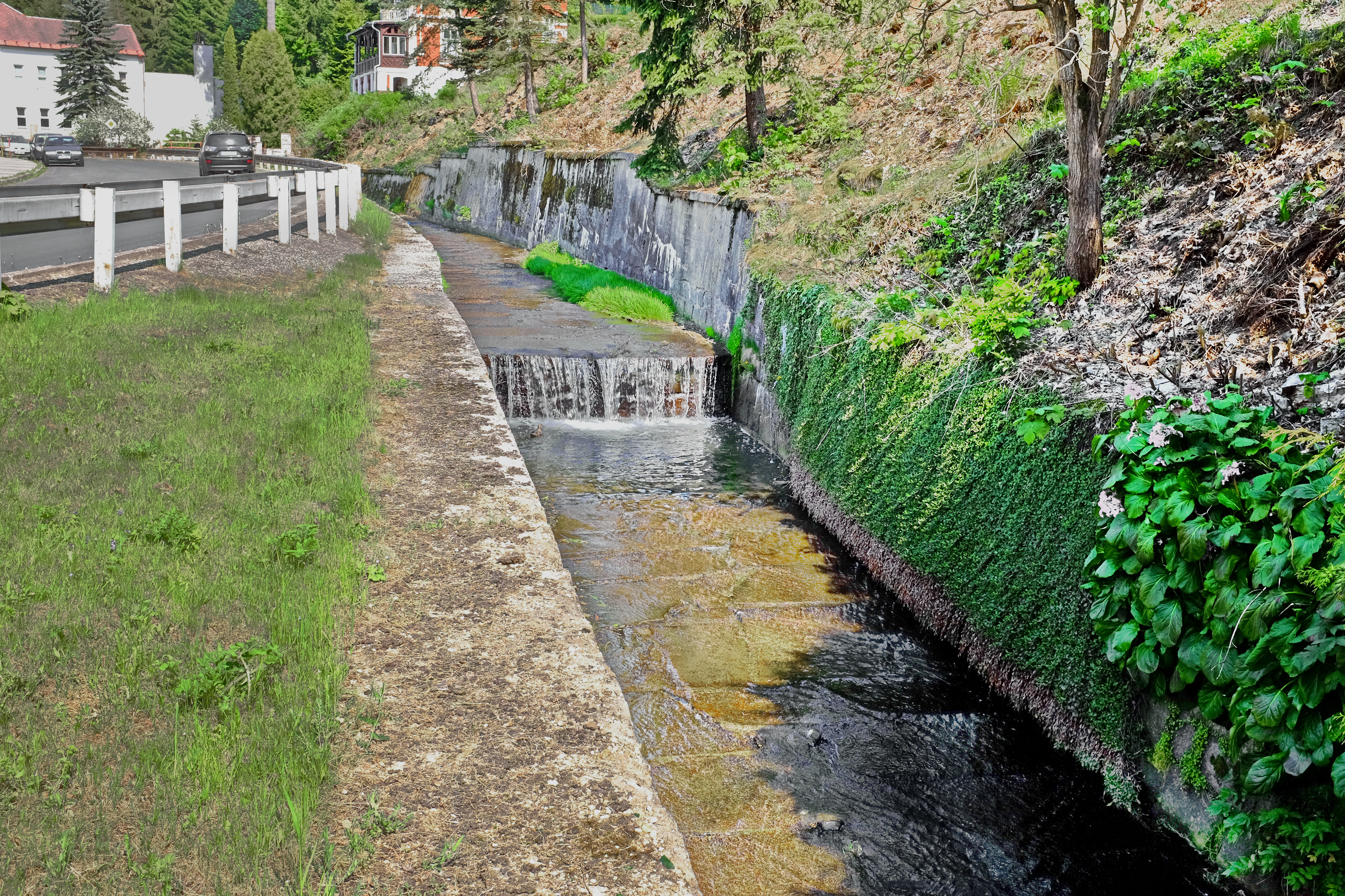 Bublavský potok, přítok Svatavy, v Kraslicích před soutokem se Svatavou, Krušné hory, okres Sokolov